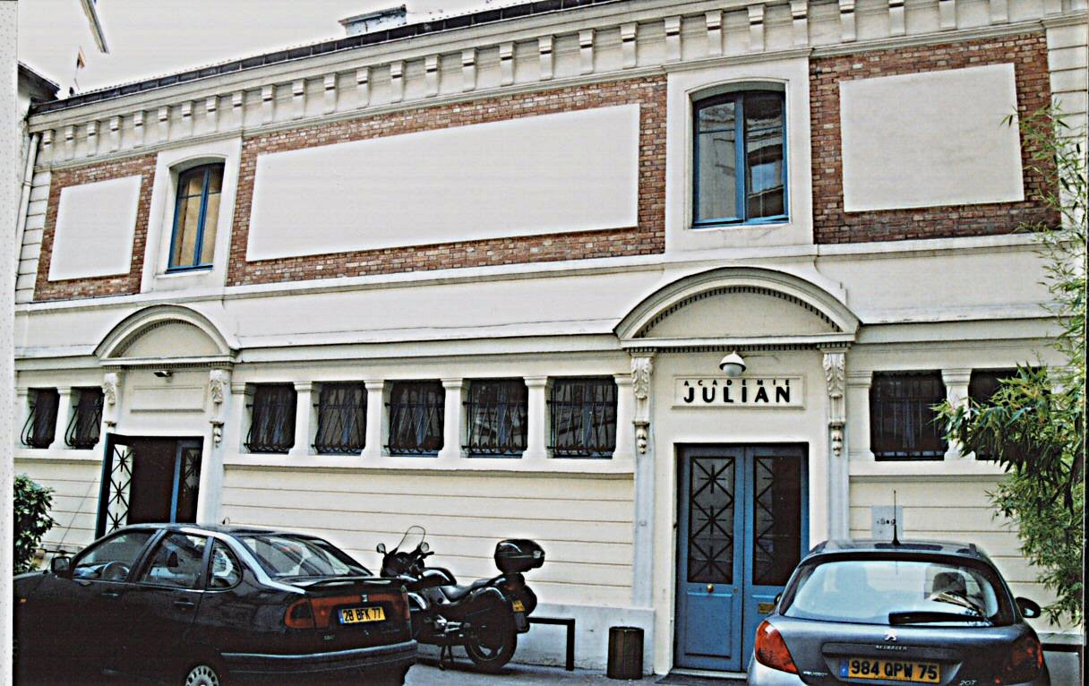 Immeuble de l'Accadémie Julien sur la rue Du Dragon à Paris qui abrite aujourd'hui l'École suppérieure d'arts graphiques Penninghen